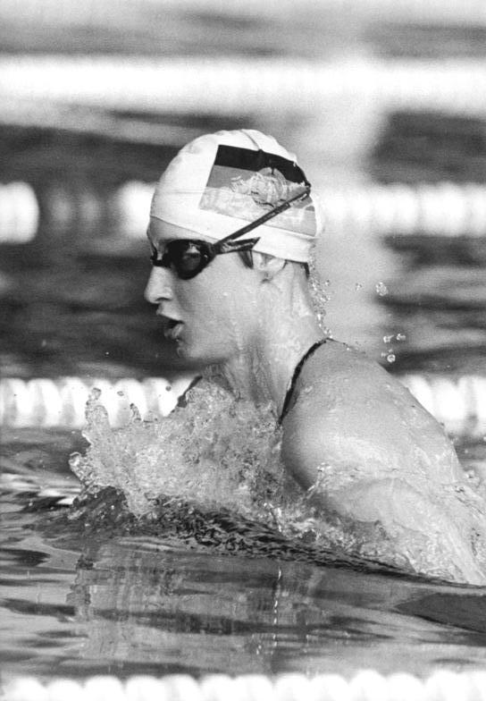 Ute Geweniger ADN-ZB Mittelstädt 2-7-1981 Berlin: 32. DDR-Meisterschaften im Sportschwimmen Die 17jährige Olympiasiegerin und Weltrekordlerin über 100-m-Brust, Ute Geweniger (SC Karl-Marx-Stadt), holte sich den Meistertitel in ihrer Spezialdisziplin in der neuen Weltrekordzeit von 1:09,39 Min. Abgebildete Personen: Geweniger, Ute: Schwimmerin, DDR